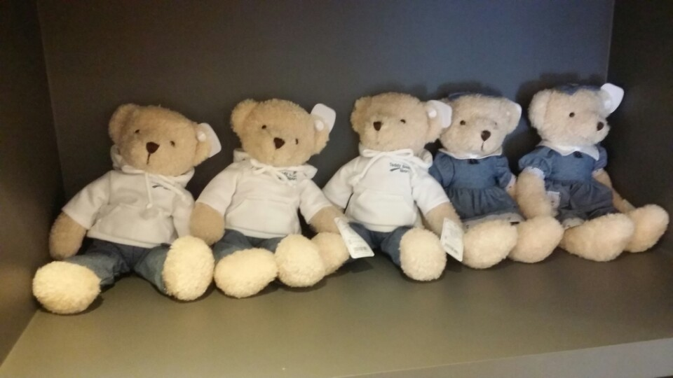 대한민국 군산 테디베어박물관에 전시되어 있는 곰인형